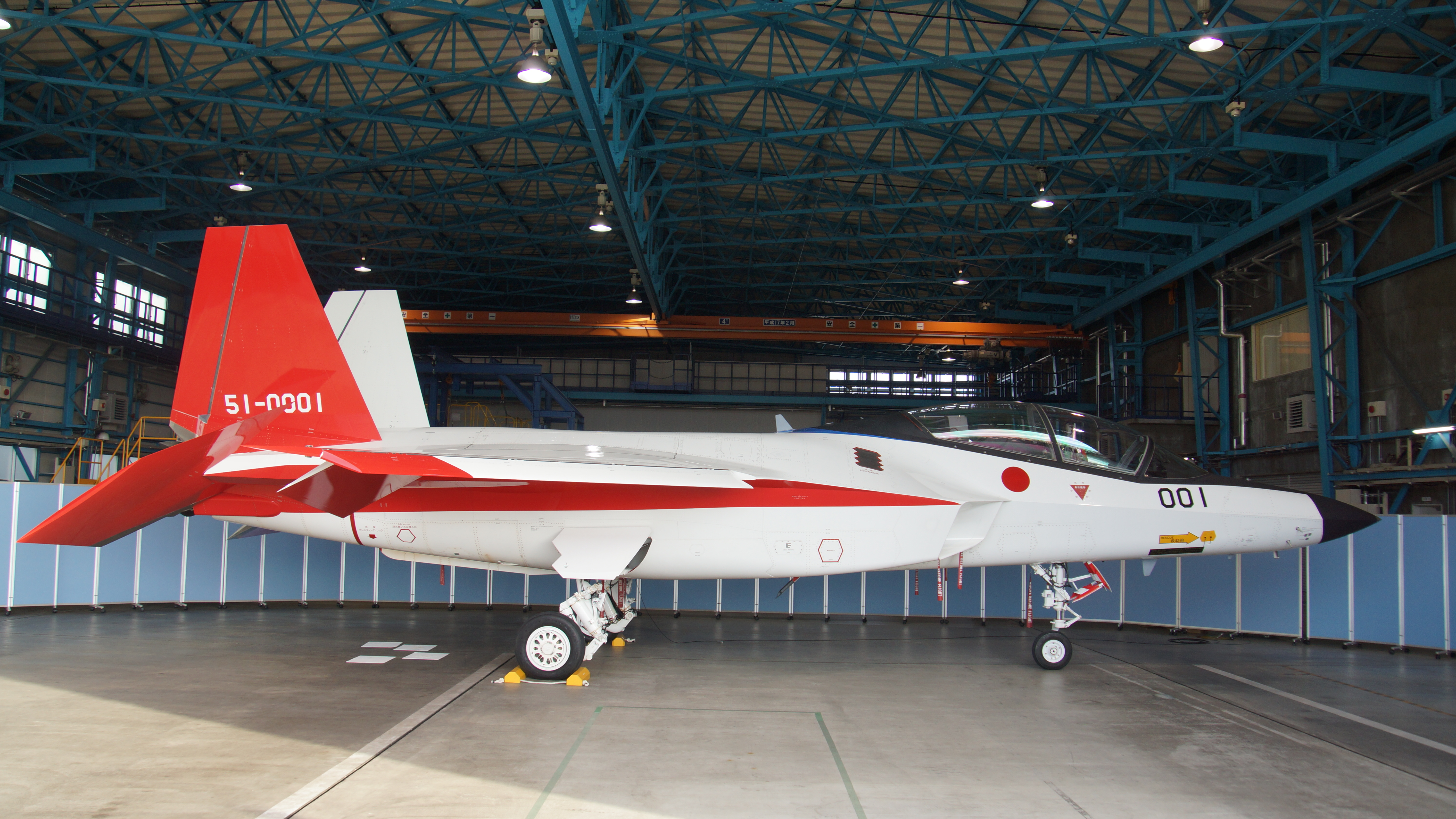 三菱 先進技術実証機X-2（51-0001号機） 右側面。2017年11月19日 航空自衛隊岐阜基地にて。